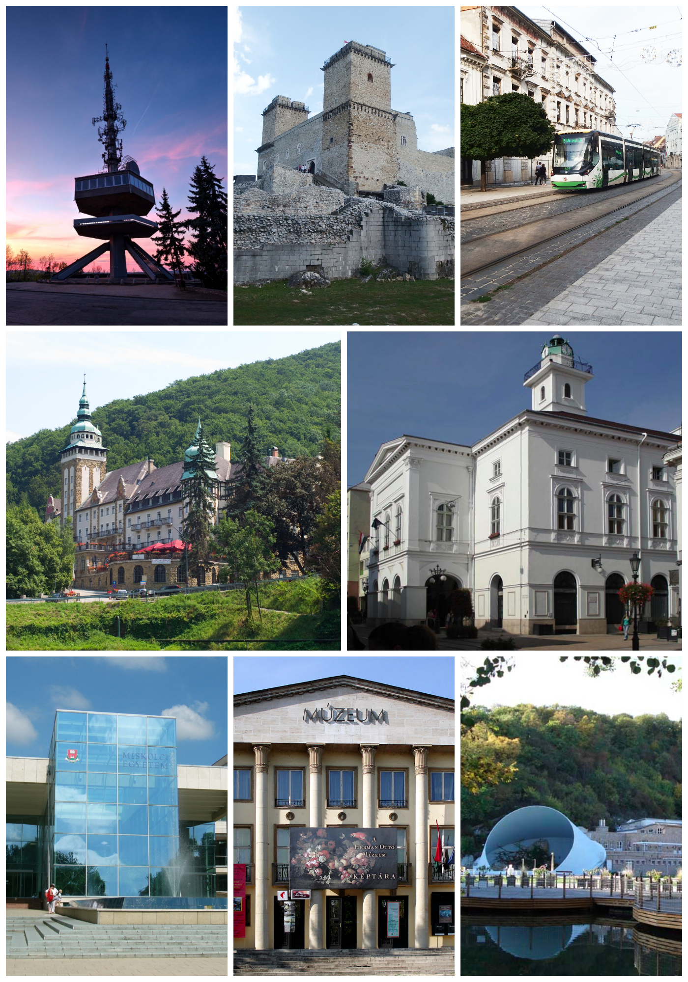 Montage Miskolcról